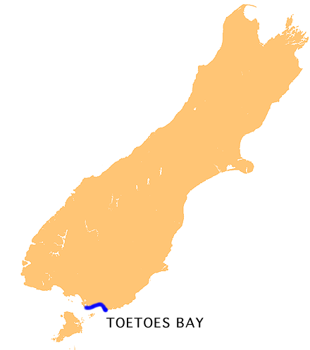 Localización de la Bahía Toetoe